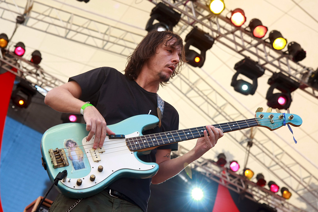 Foto: Caio Paganotti